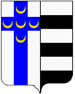 Lo stemma della famiglia senese Piccolomini-Patrizi.